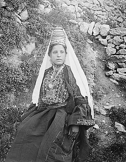 Woman in Bethlehem, Palestine